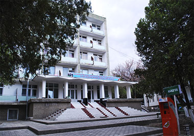 Тоҷикӣ: Бинои мизоҷони осоишгоҳи "Зумрад" дар Исфара